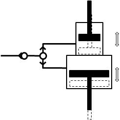 HVA-Spielausgleich Ventillaenge_Lage